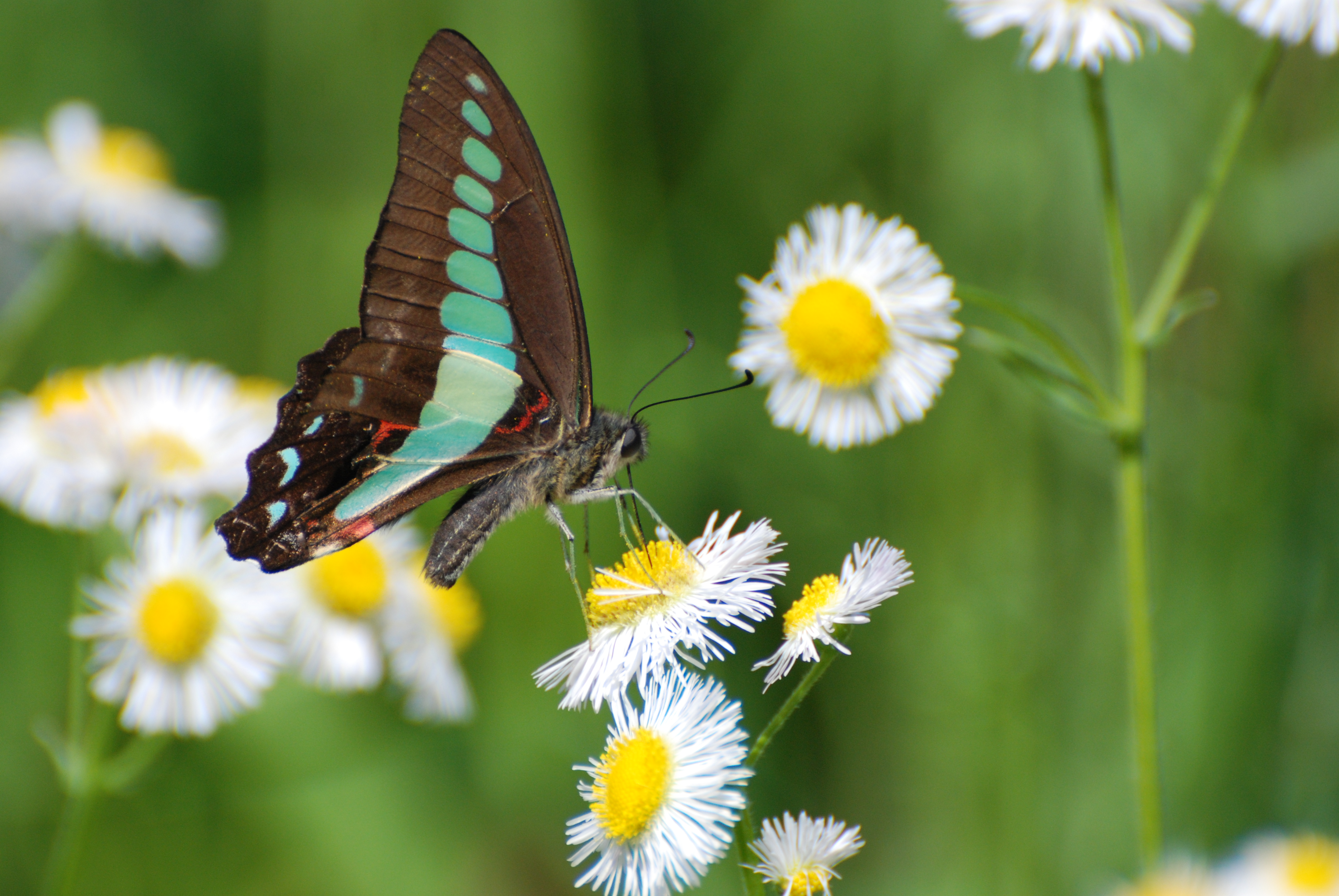 Graphium sarpedon, Osaka, Japan